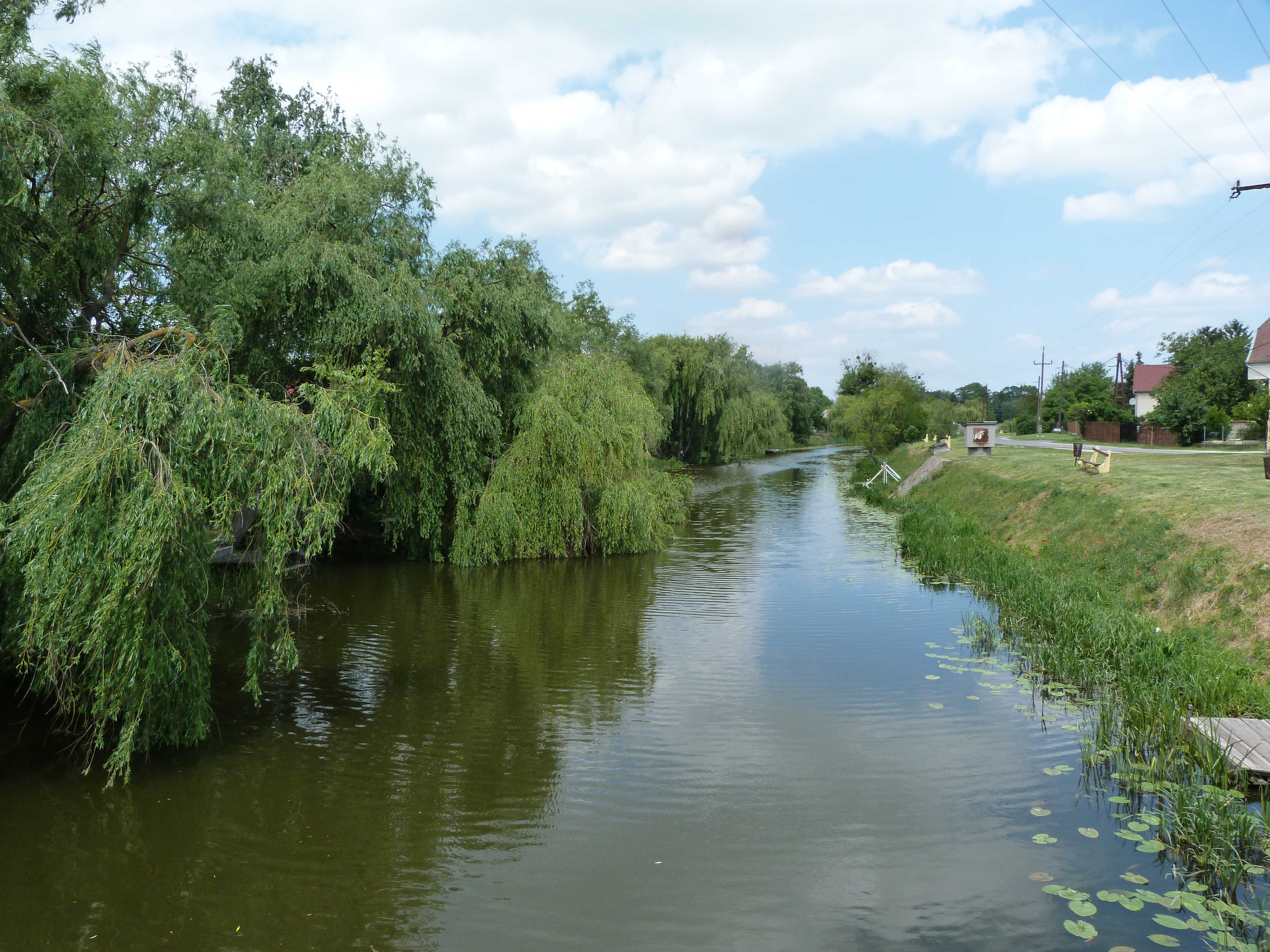 A felvétel 2013. Május 24 –én készült. A Nyugati övcsatorna a 76 –os útnál. ©© Published under Creative Commons in the Metapolisz DVD line. All of the photos and vids in the Metapolisz DVD line are under Creative Commons and can be used even for commercial – for profit – purposes. Recommended Citation Derzsi Elekes Andor: Metapolisz DVD line